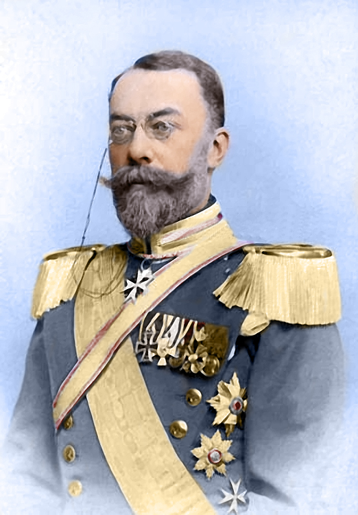 Ich habe Christian Kraft zu Hohenlohe-Öhringen "neu eingefärbt"